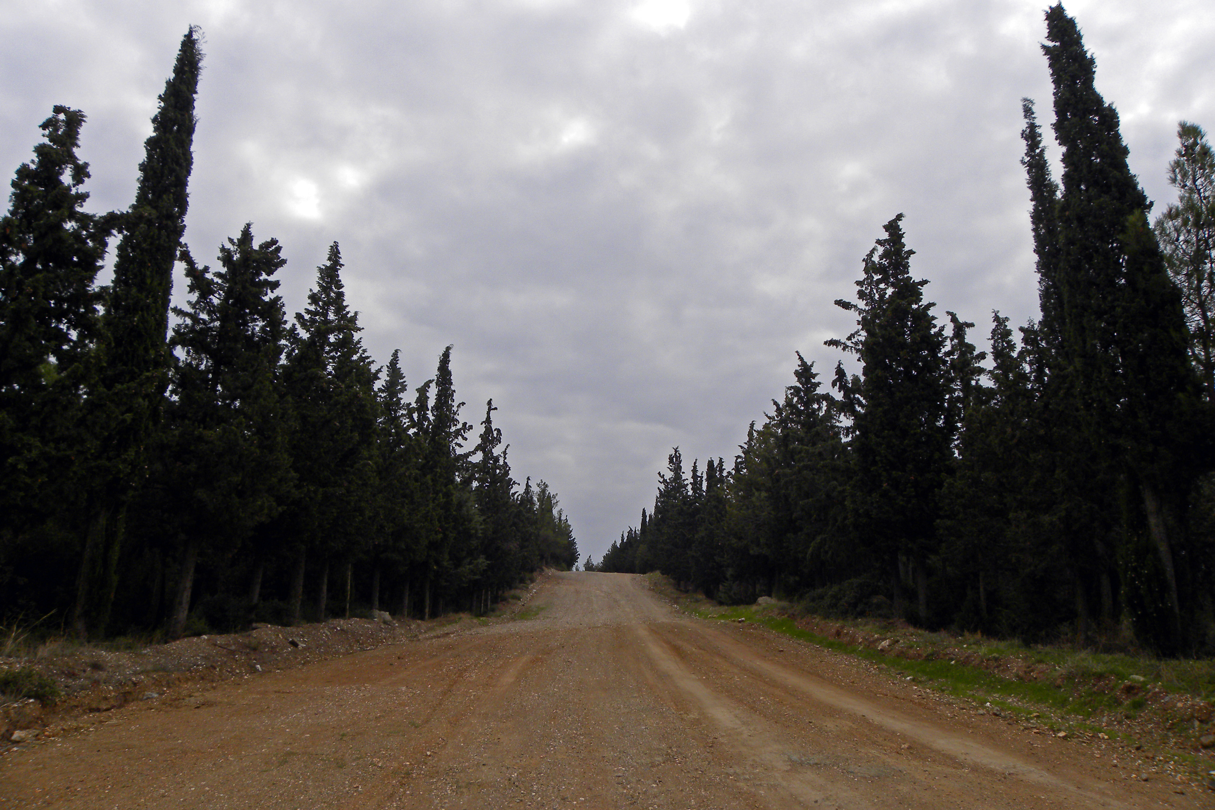 Σειχ Σου Θεσσαλονίκη